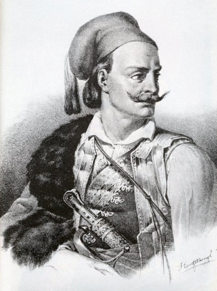 Κίτσος Τζαβέλλας. Λιθογραφία.